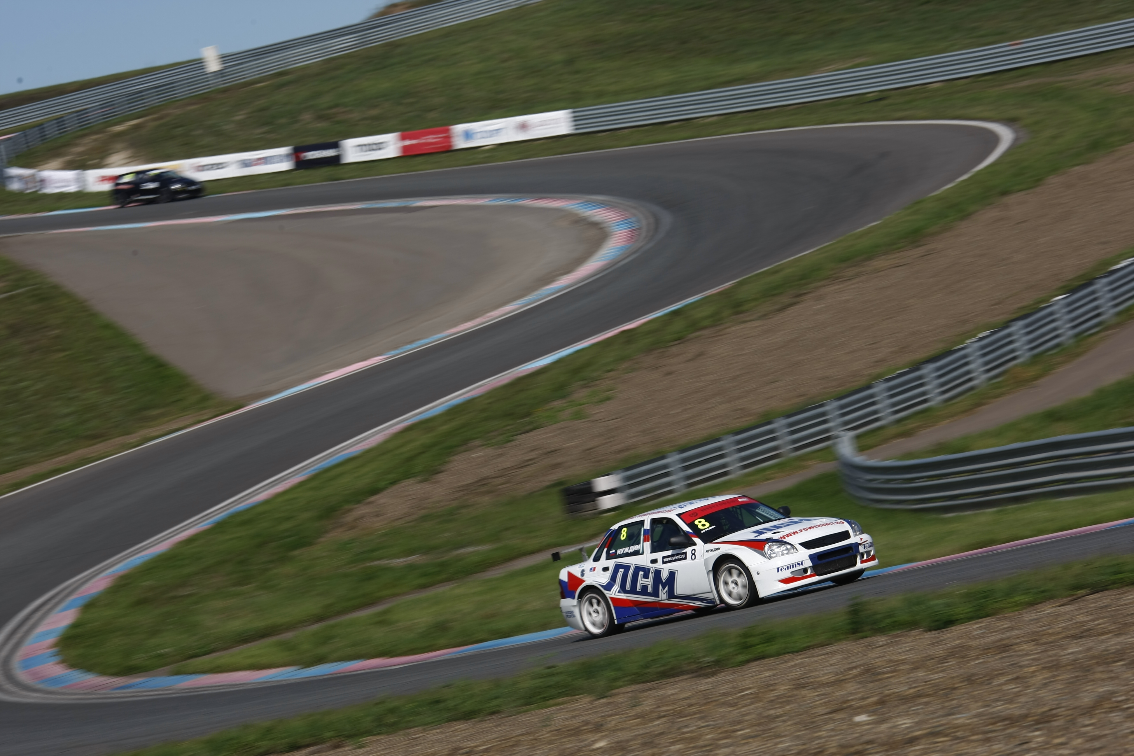 Гоночная Лада Приора выступает на Казанской трассе Russian Racing Championship.